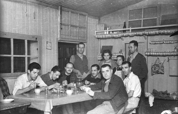 Igaratzako aterpean. Jesus eta Pedro Elosegui, Pilar Sansinenea, Reyes Corcostegui, Jose Maria Thomas, Francisco Español, Ramon Margalef, Joaquin Mateu, Estefania Elizalde eta Manuel Laborde.